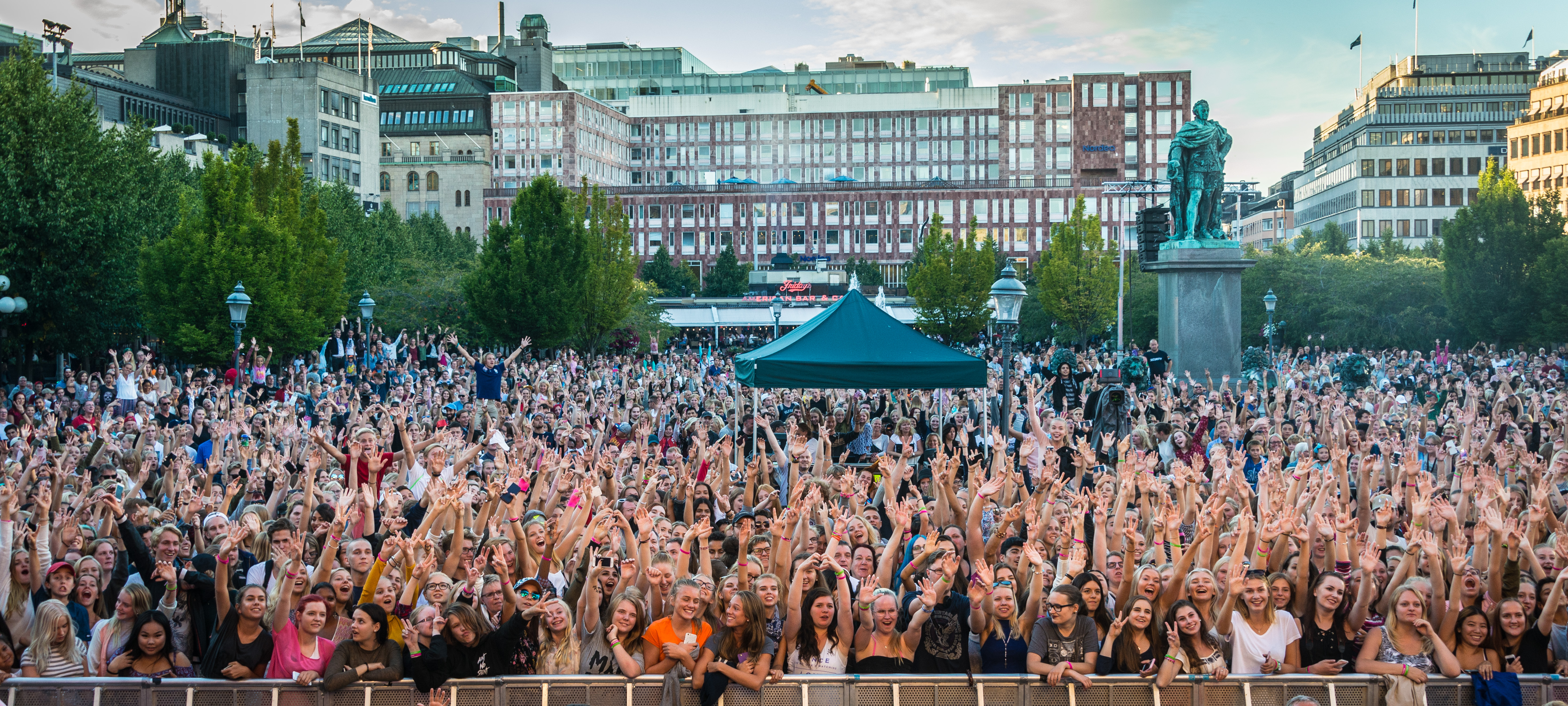 Publikhavet på RIX FM Festivalen 2016 i Kungsträdgården i Stockholm.